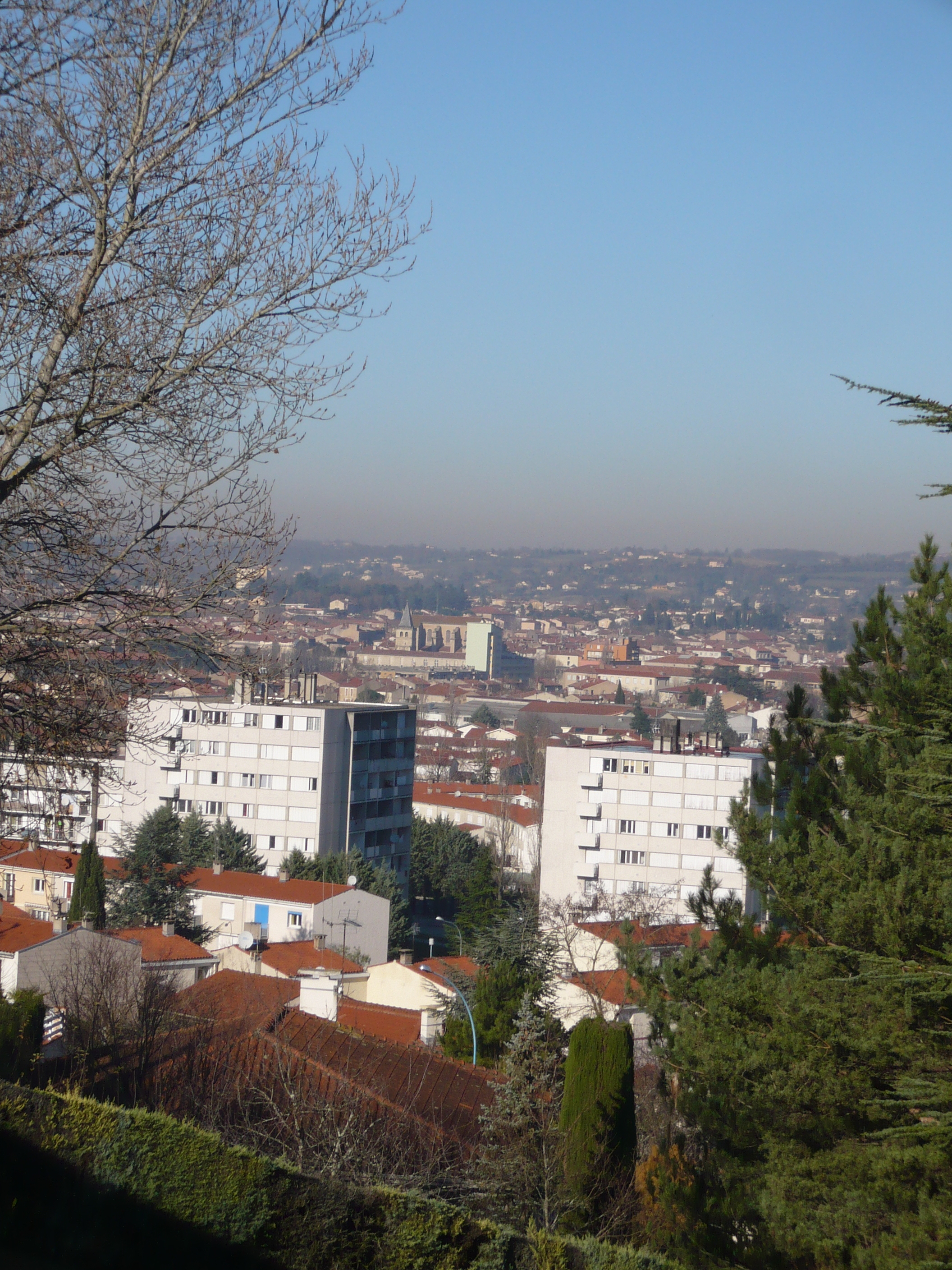 Castres